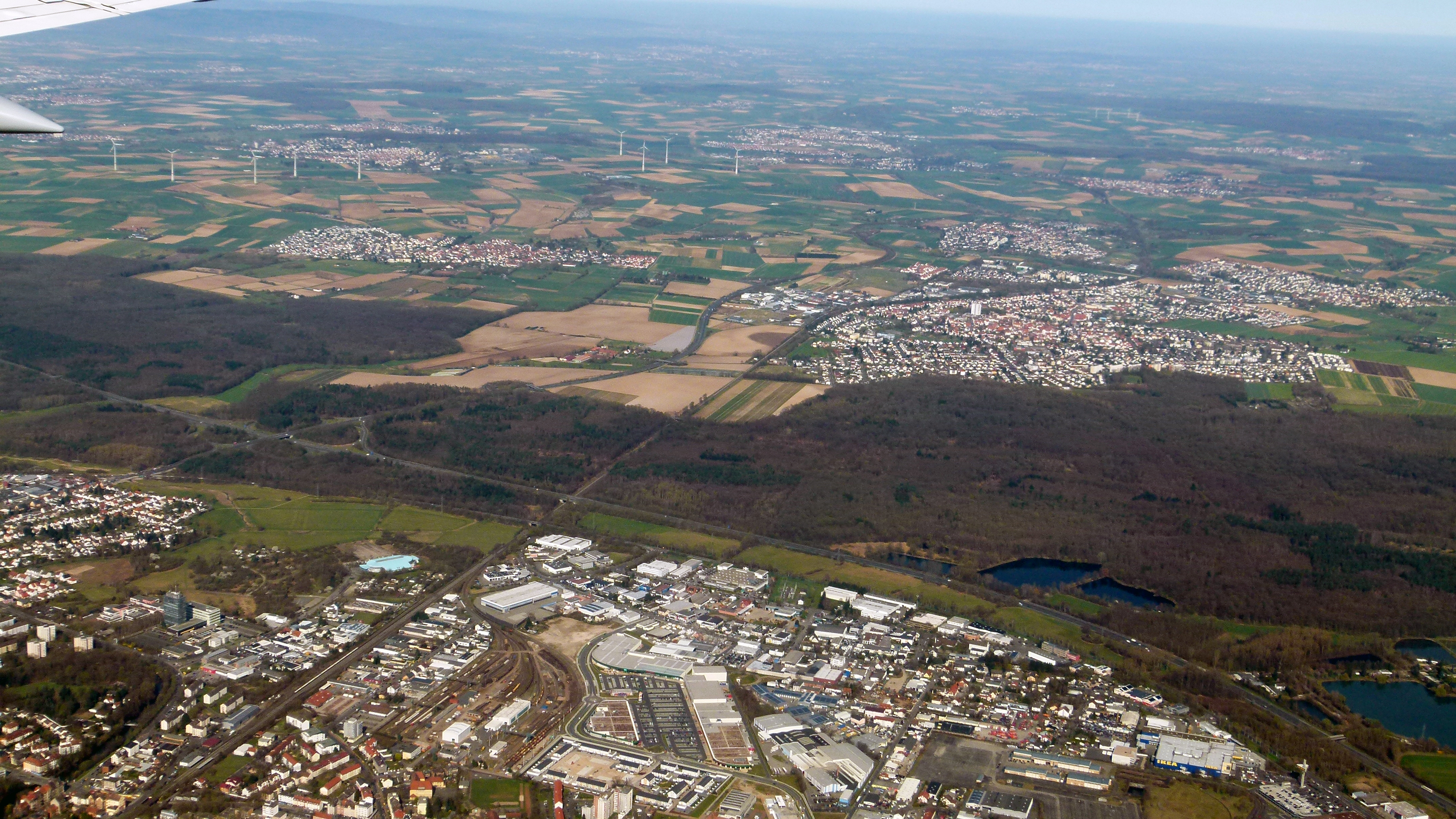 Luftbild von Hanau, Bruchköbel, Mittelbuchen